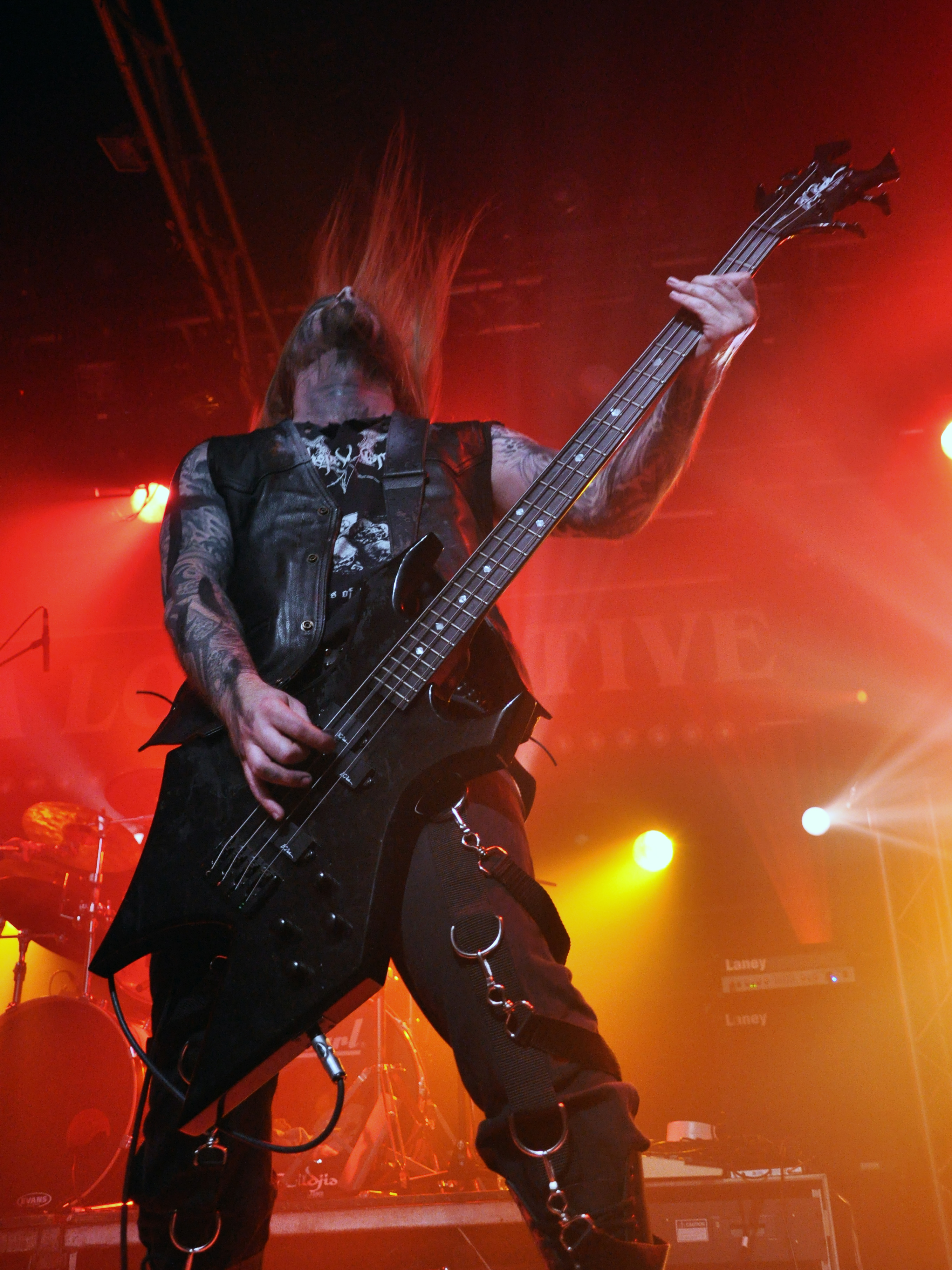 Setherial à Paris le 09/05/2009. Le groupe jouait au Black Metal Is Rising 5 organisé par les Acteurs de l'Ombre. Setherial est un groupe de Black Metal suédois.